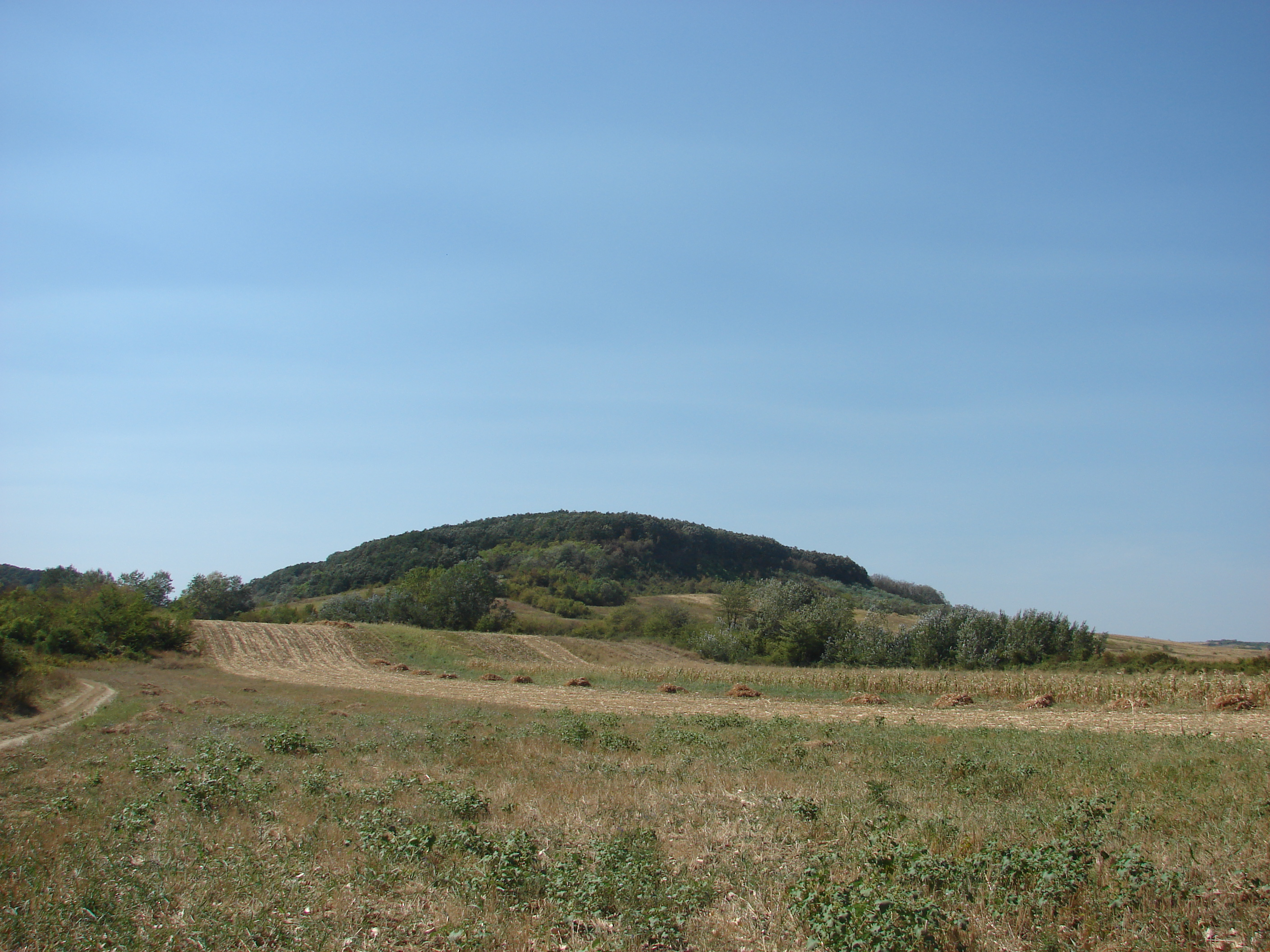 Imagine de la drumul spre Cetatea Jidovilor